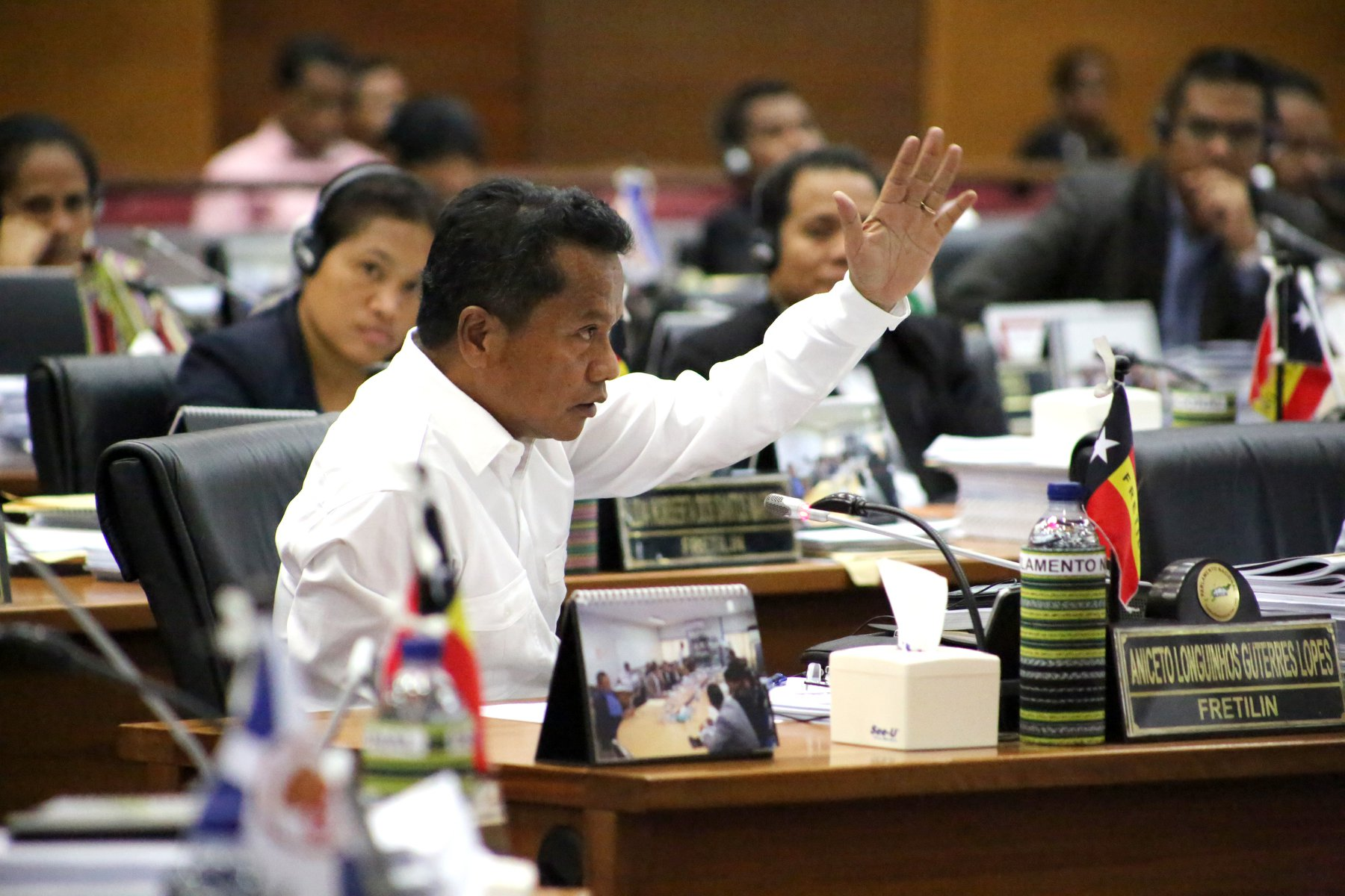 Aniceto Longuinhos Guterres Lopes im Nationalparlament Osttimors